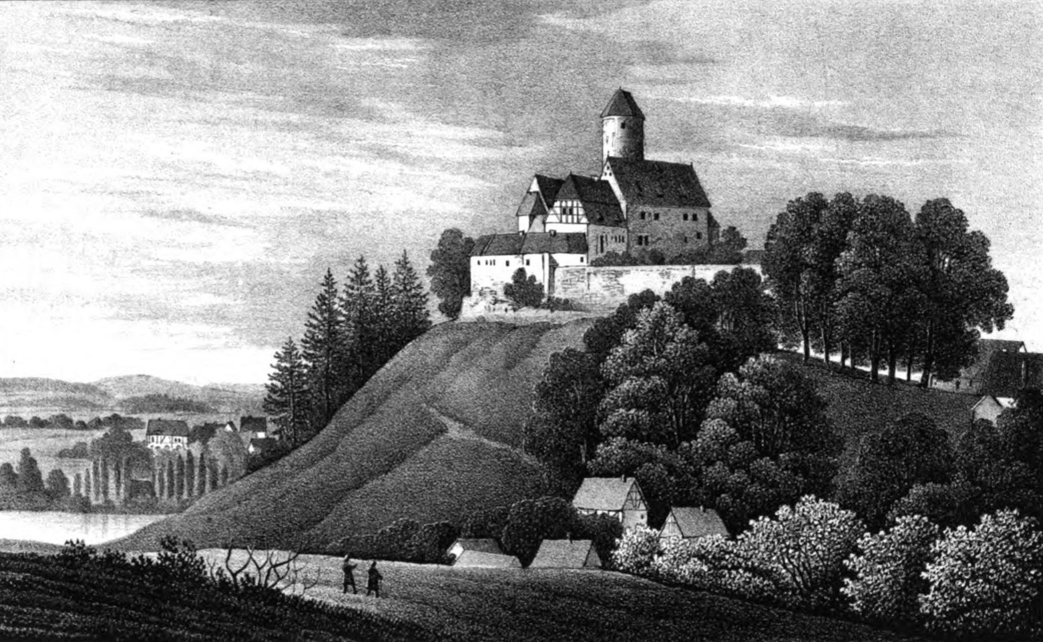 Saxonia Museum für saechsische Vaterlandskunde. Band 2. Dresden: Pietzsch und Comp. Siehe File:Saxonia Museum für saechsische Vaterlandskunde II.djvu